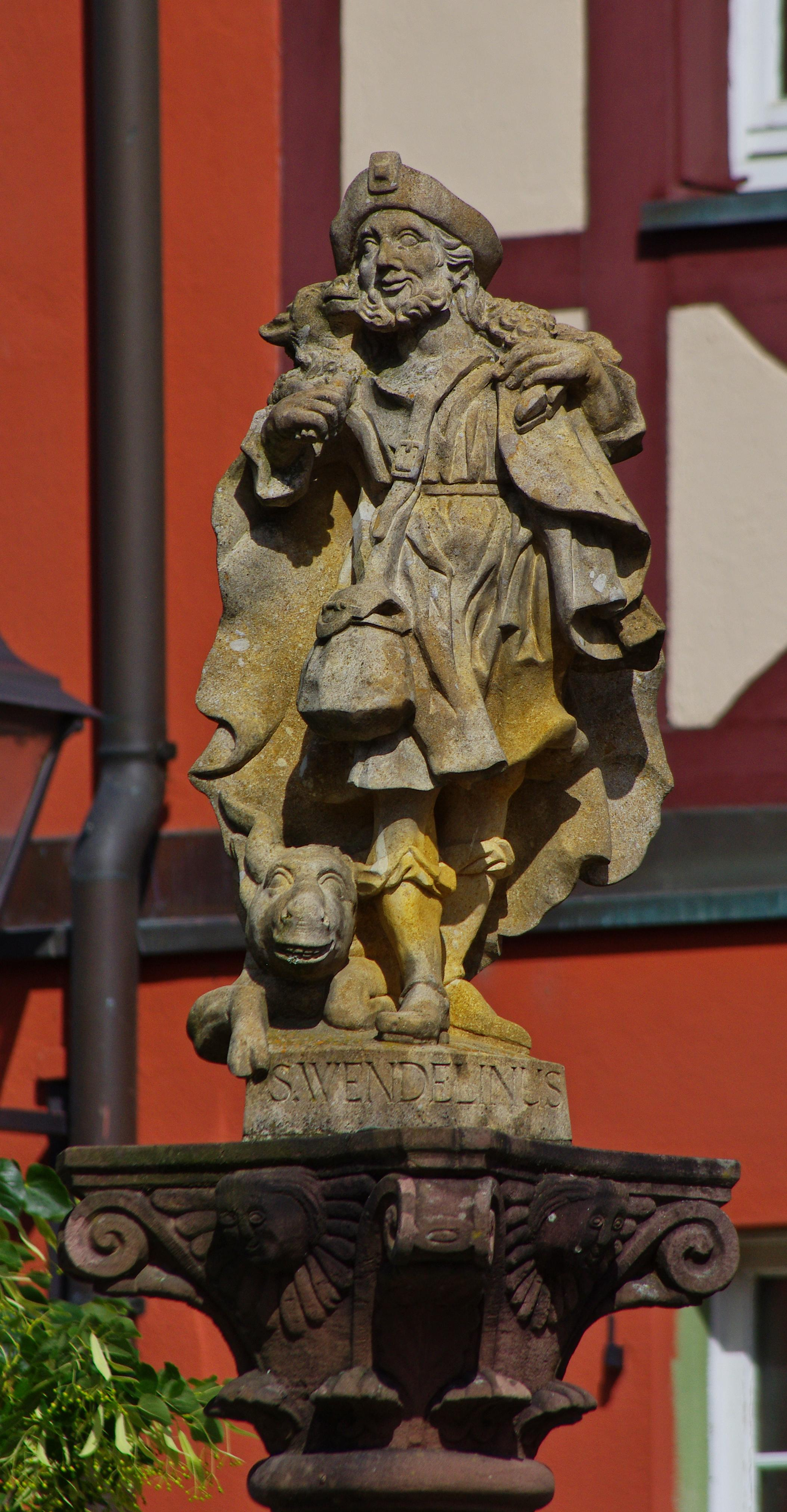 St. Wendelinus auf dem Stockbrunnen in Merdingen